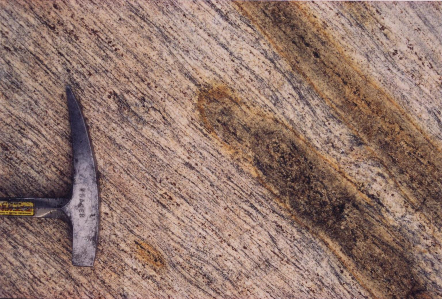 Incipient Charnockite, Conradgebirge, Dronning Maud Land, Antarktika.